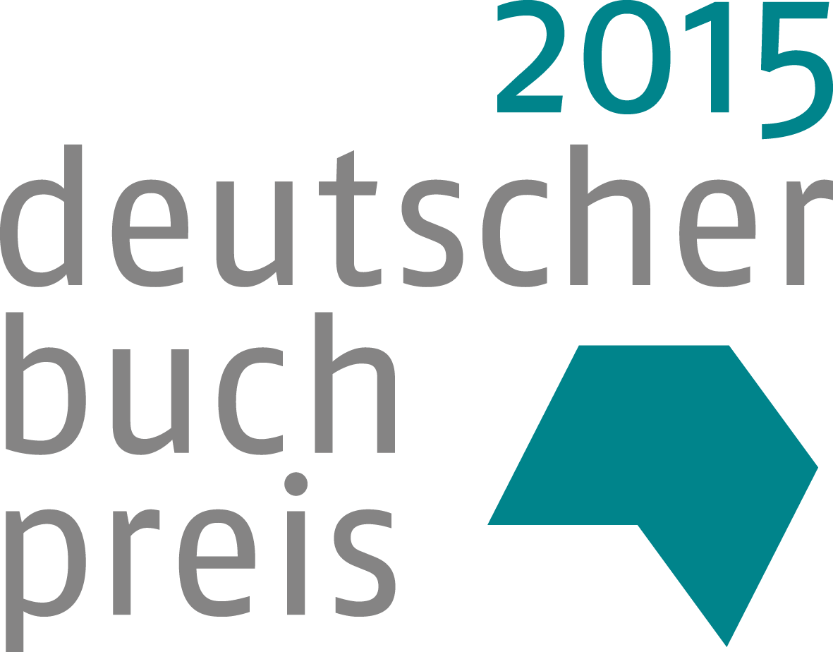 Logo Deutscher Buchpreis 2015